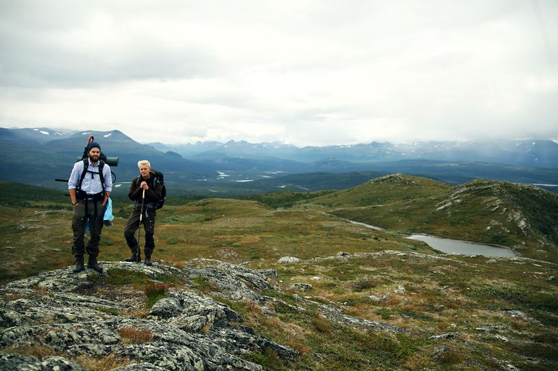 Jägmästarstudenter i fjällvärlden under norra sverigeresan foto: Johanna Hägglund